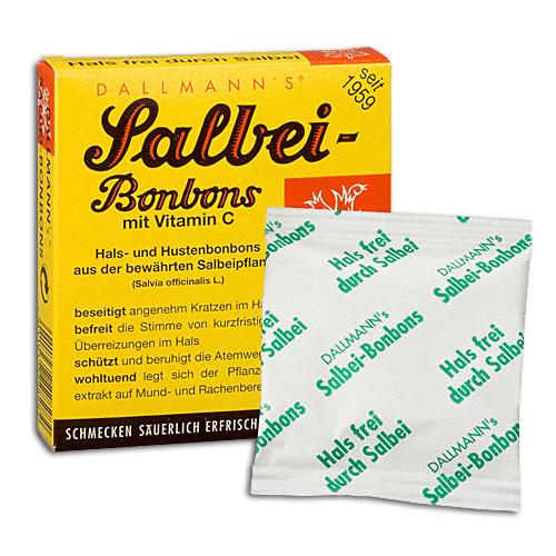 Salbei